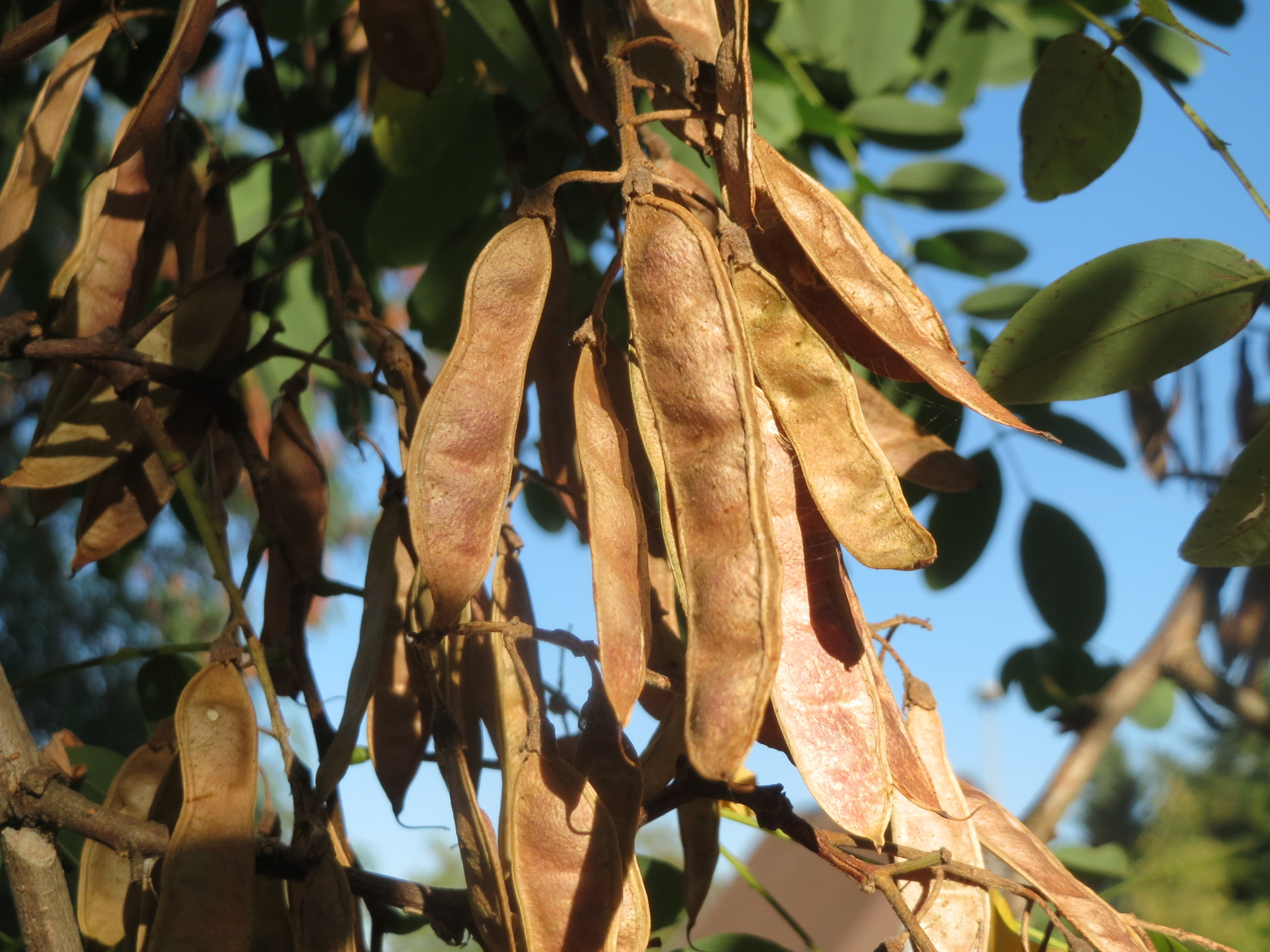 Robinie (Robinia pseudoacacia) im Landesgartenschaupark Hockenheim